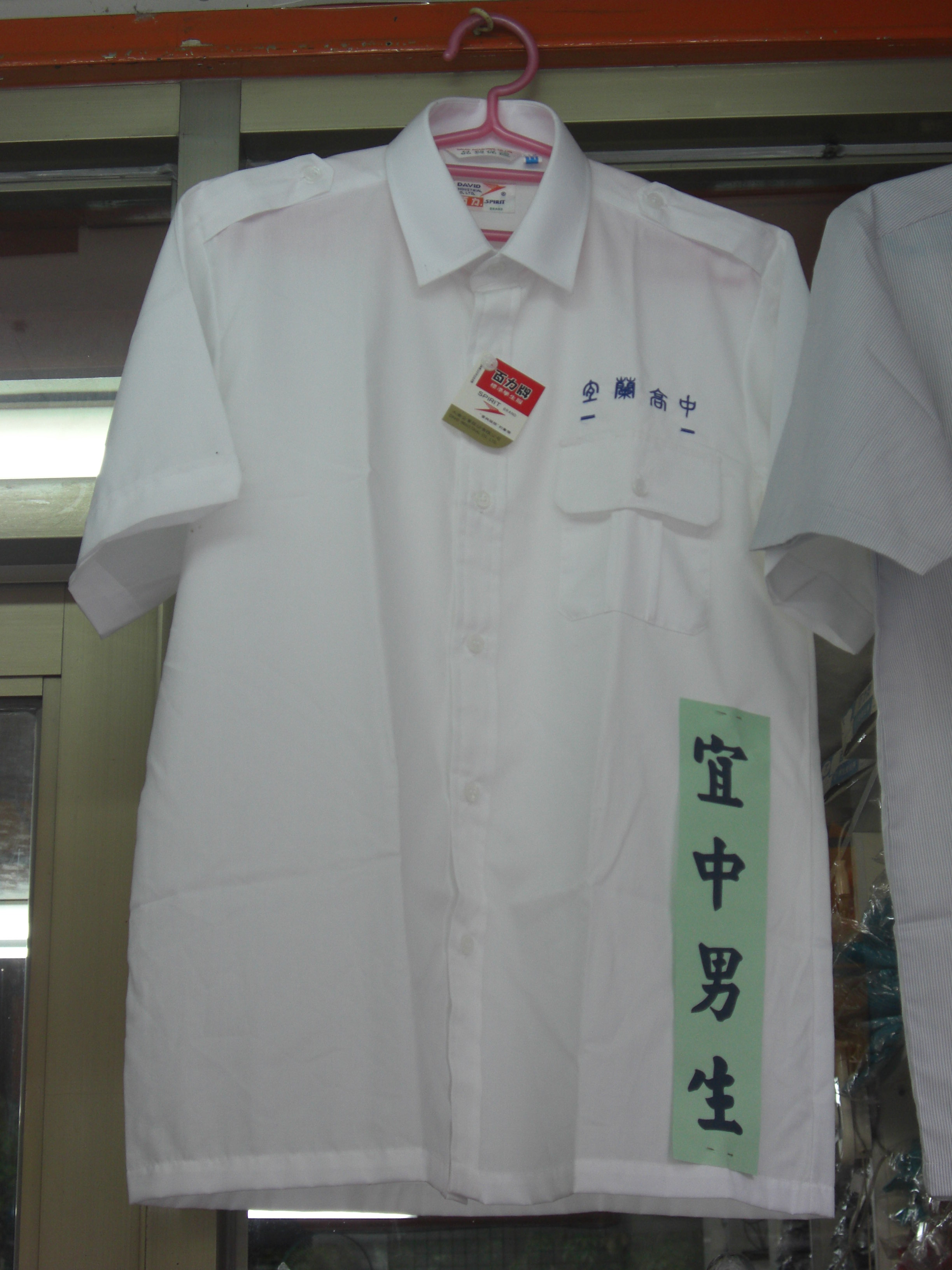 中文（台灣）: 宜蘭高中男生夏季制服照片。